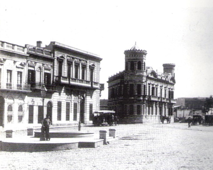 Vista de la calle Sante Fe frente a la Plaza San Martín, hacia fines del siglo XIX. Se destaca en el centro de la imagen la residencia construida para la familia Haedo, habitada desde 1881 por la familia Villar. Remodelada haia 1940 al estilo neogótico, es actual sede de la Administración de Parques Nacionales. Buenos Aires, Argentina.